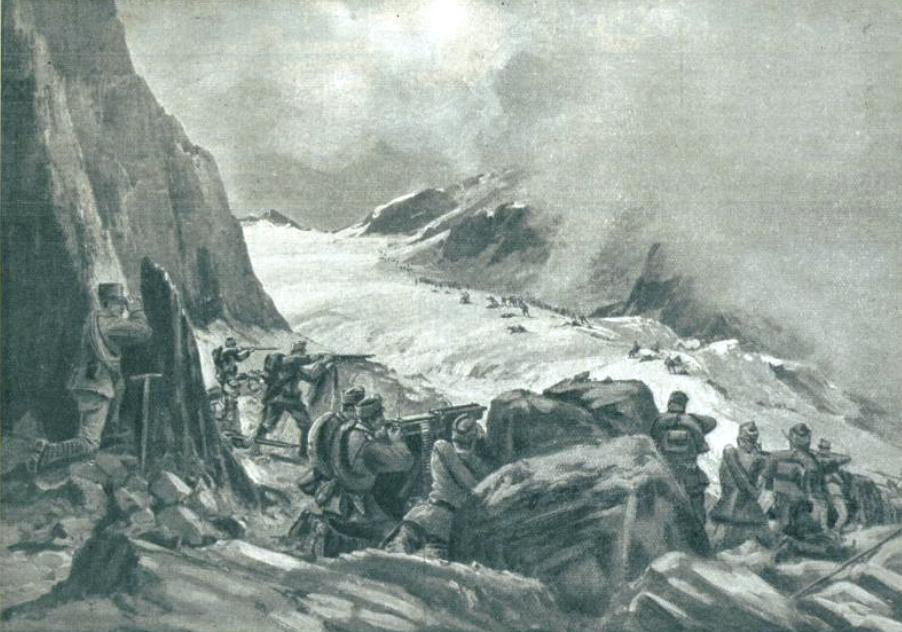 Avstro-ogrske čete odbijajo na ledeniku Presanella napad alpinov.